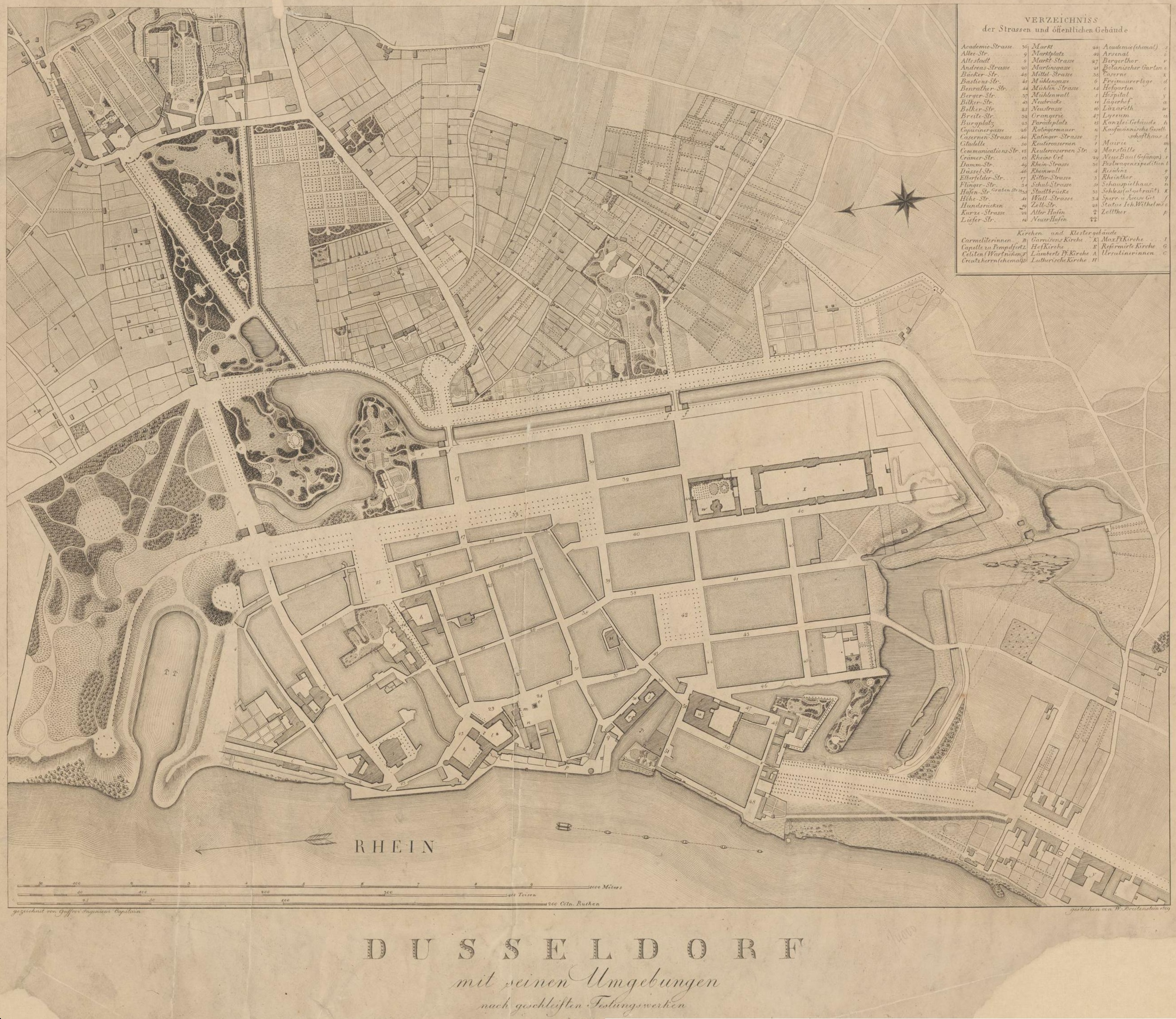 Stadtplan: Düsseldorf und seine Umgebungen : nach geschleiften Festungswerken Kupferstich ; 56 x 71 cm ; 1 : 4 000